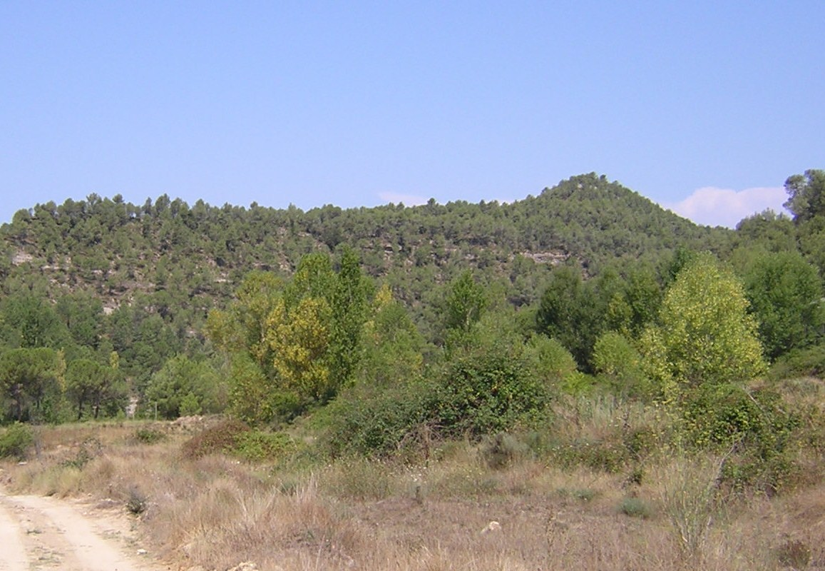 Serrat de la Tirolena (Monistrol de Calders, Moianès)